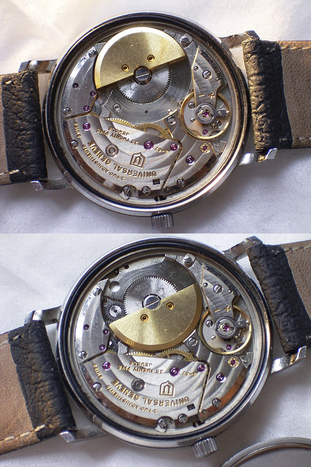 ホワイトシャドウのマイクローターの同左